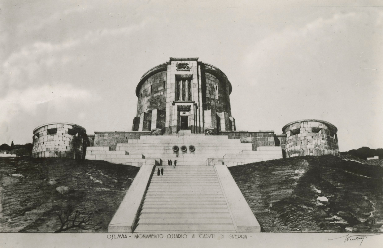 Oslavia - prospetto del Monumento - Ossario ai caduti (in via di ultimazione)